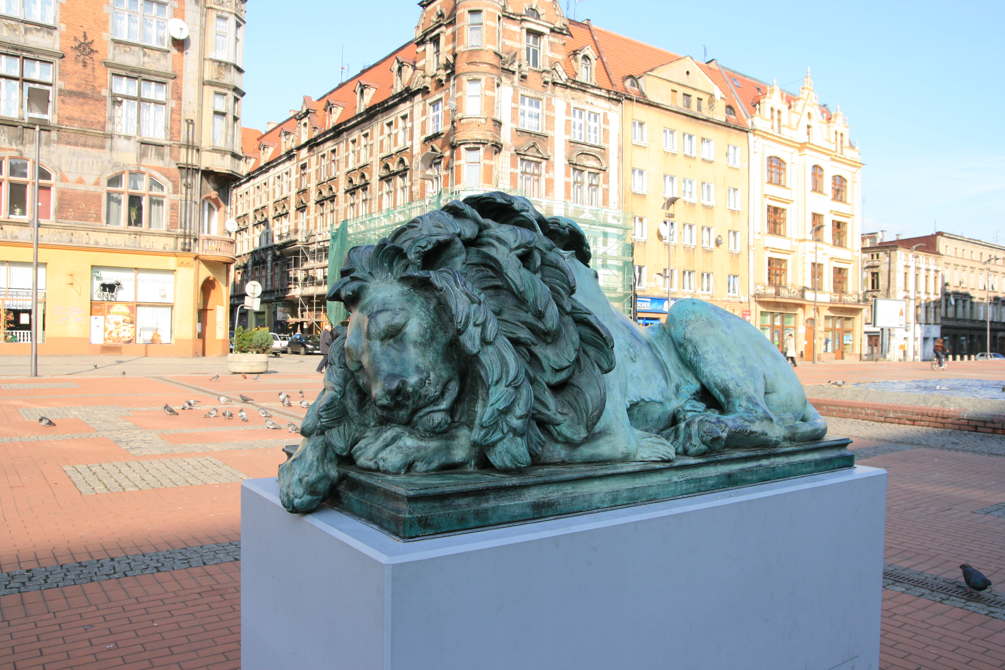 Pomnik "Śpiącego Lwa" stojący obecnie na rynku w Bytomiu, Theodor Kalide, pracownia D. Raucha.